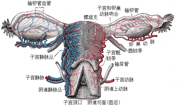 Gefäßversorgung der Gebärmutter und der Adnexe